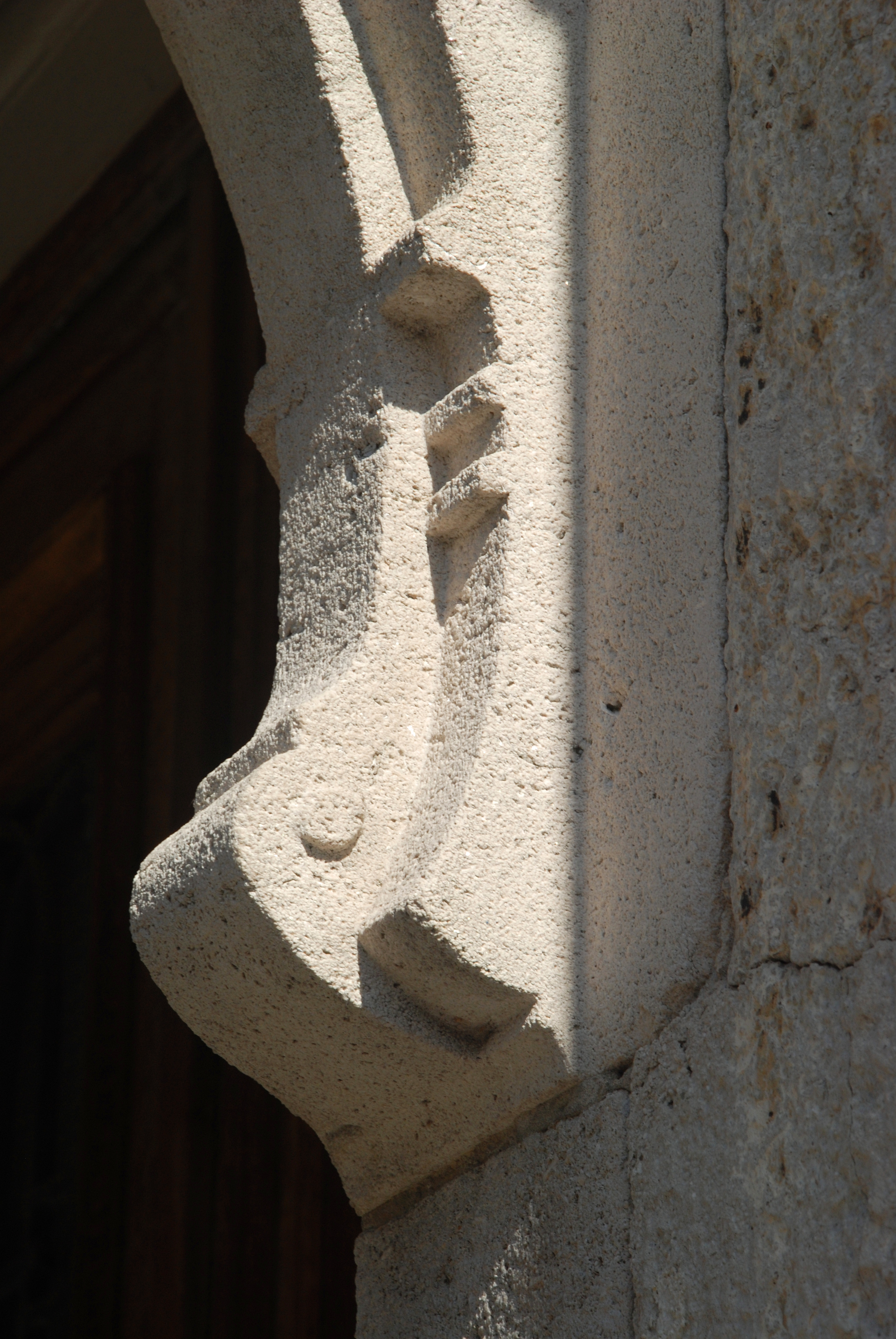 Belgique - Bruxelles - Centre scolaire du Souverain